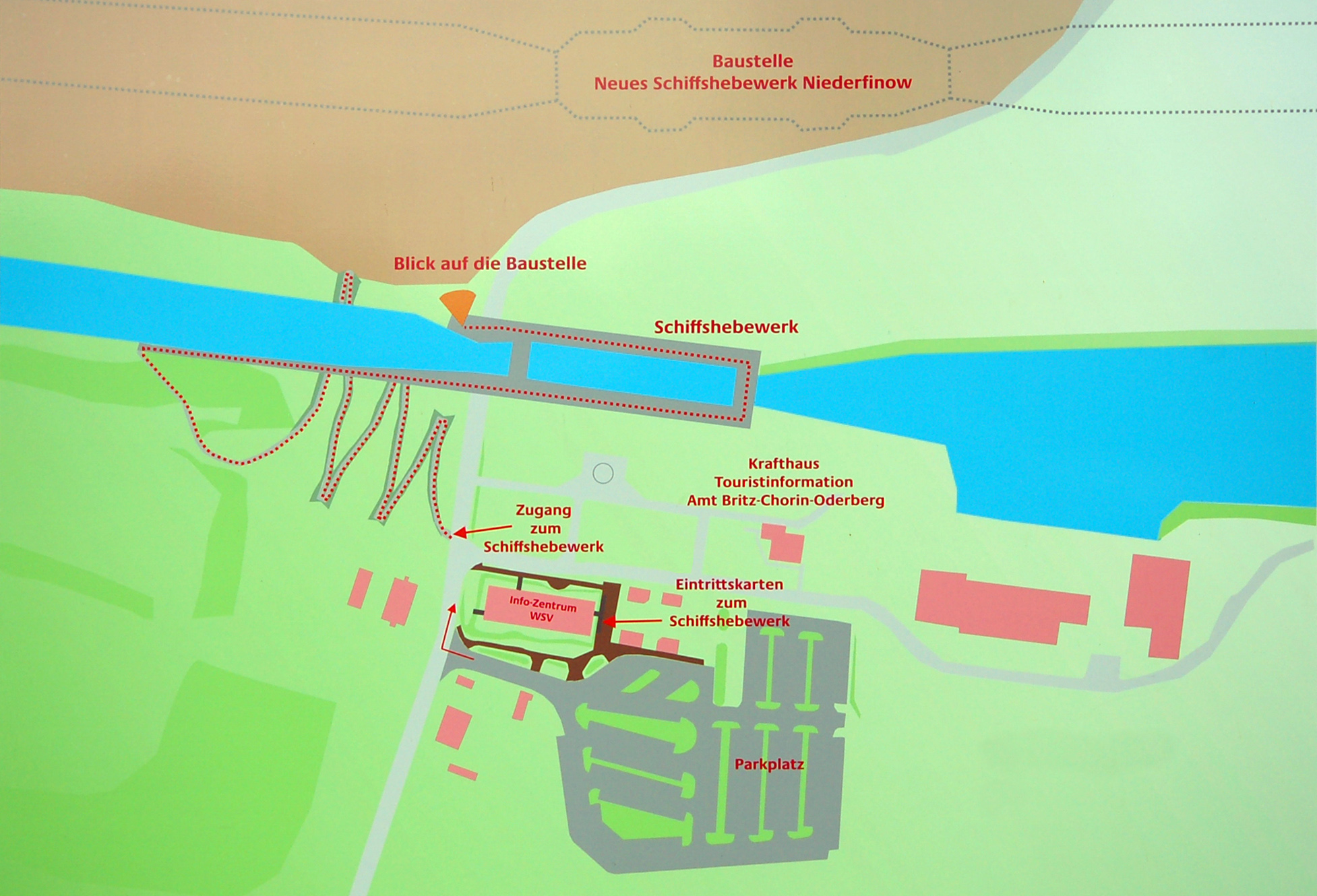 Lageplan; öffentlich dauerhaft aufgestellt